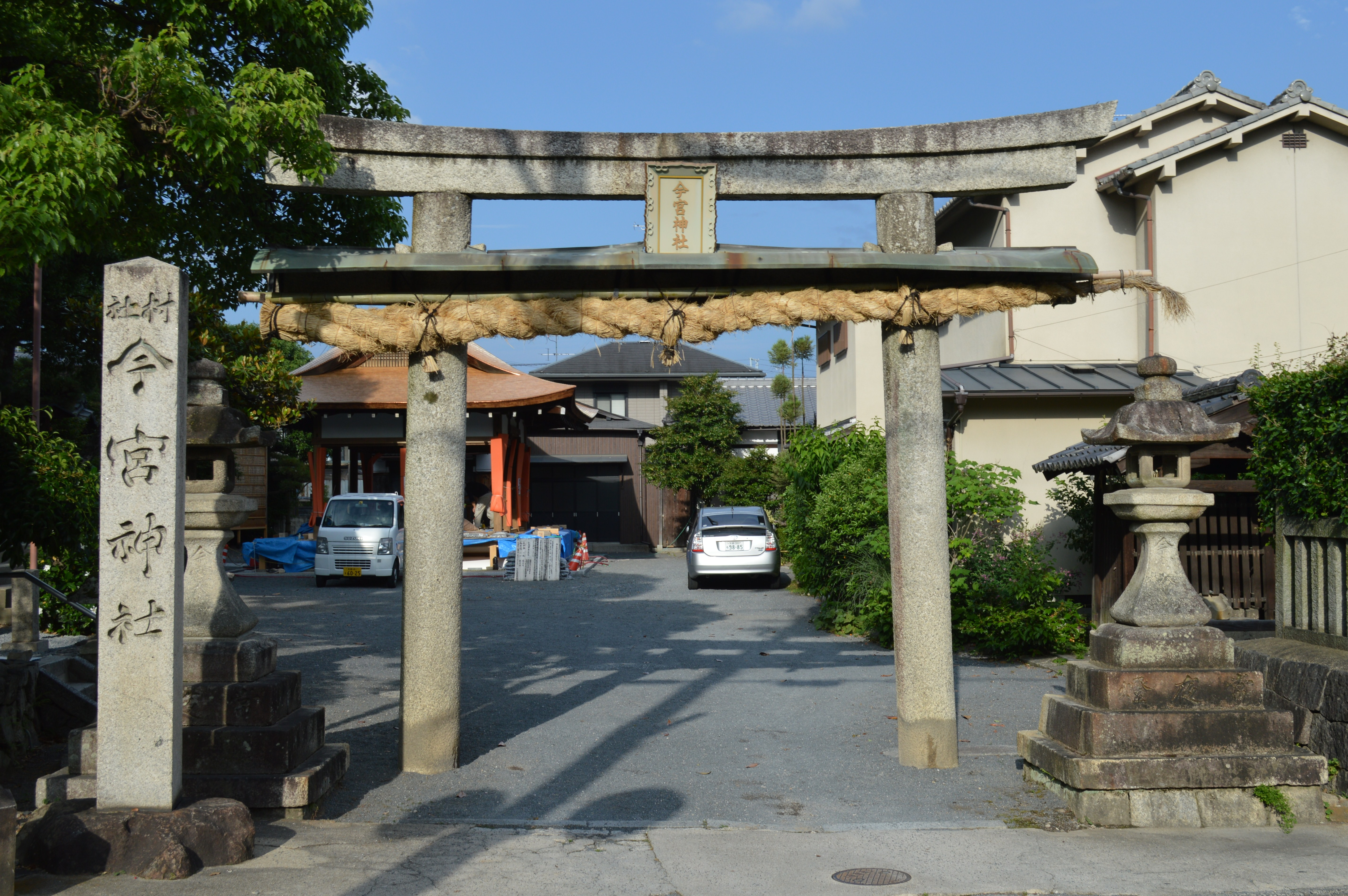 京都市右京区花園 今宮神社 (京都市右京区) 鳥居、改修中の舞台（左奥）